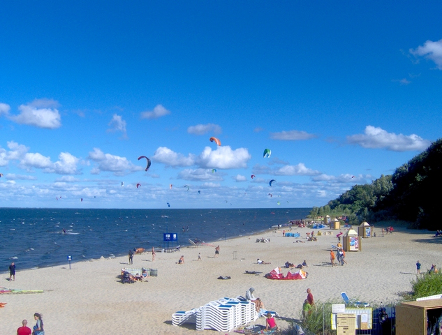 Plaża w Pucku - kitesurferzy, powiat pucki, województwo pomorskie, lato 2006. Beach in Puck - kitesurfers, Puck district, Pomorskie voivodeship, Poland, Baltic Sea, summer of 2006. Autor: Krzysztof